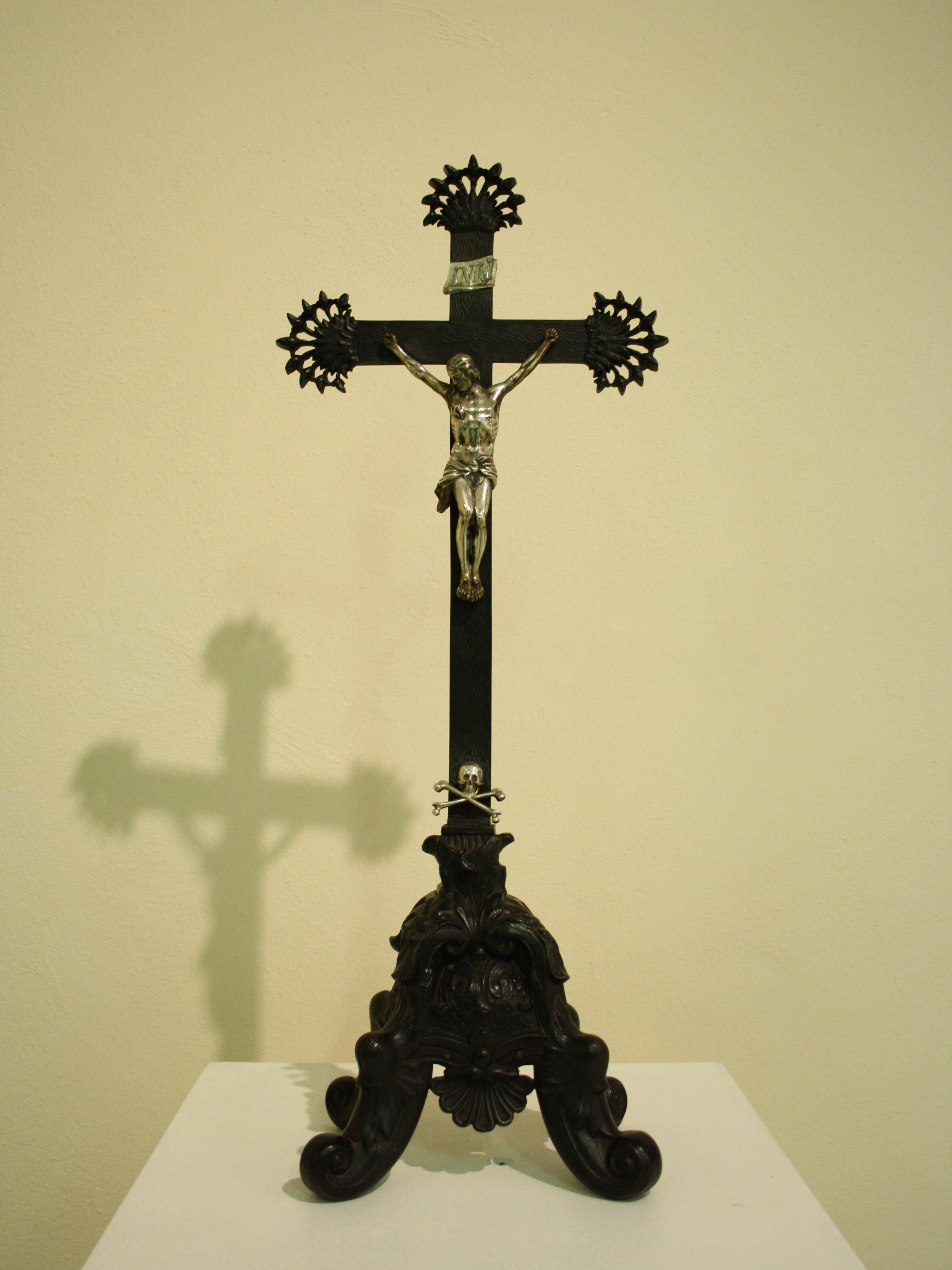 Altarkreuz der Rosenthalkapelle der Kirche St. Nikolai in Nordhausen aus dem Jahr 1859, 1945 verschollen, 2015 wiedergefunden